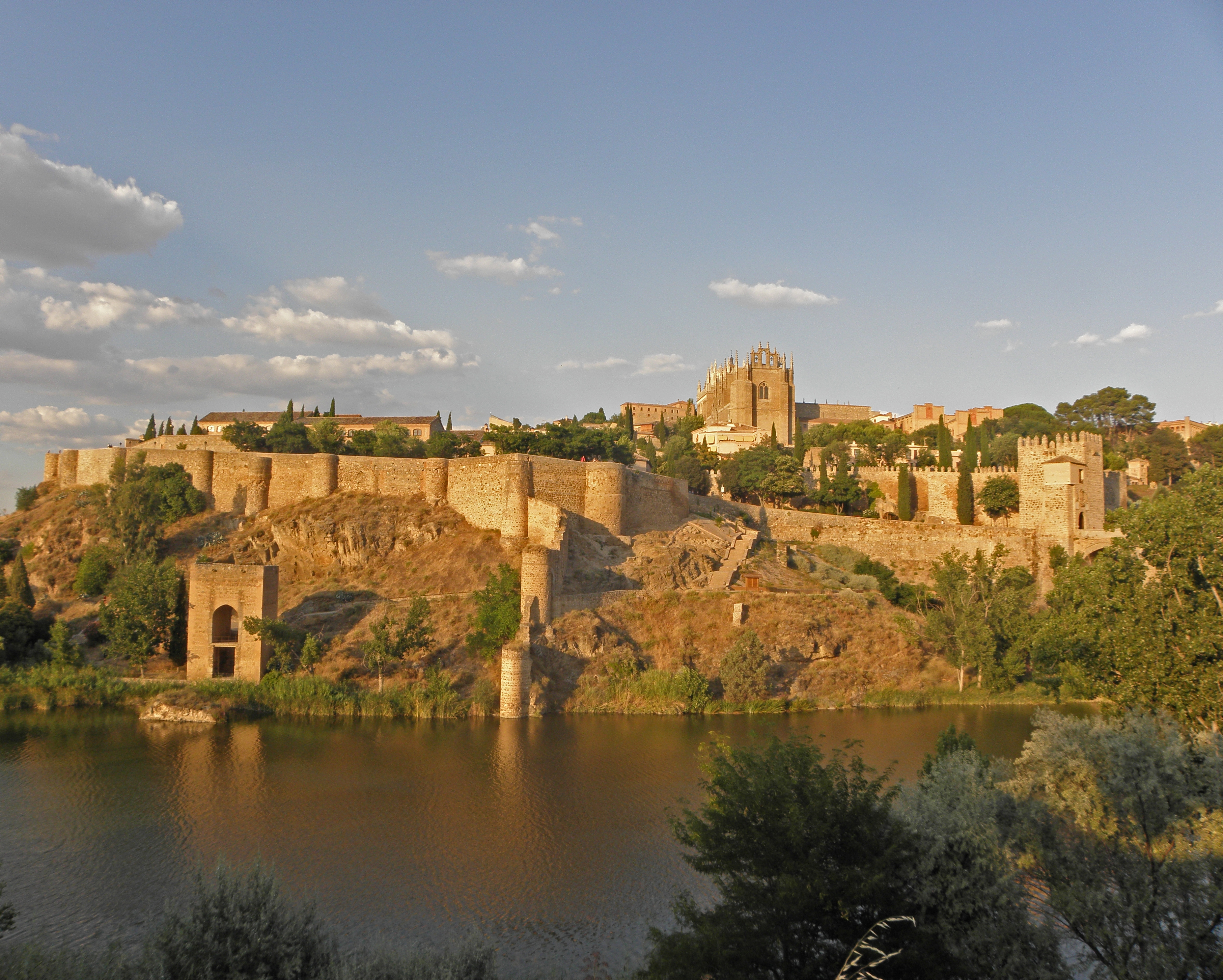 Toledo